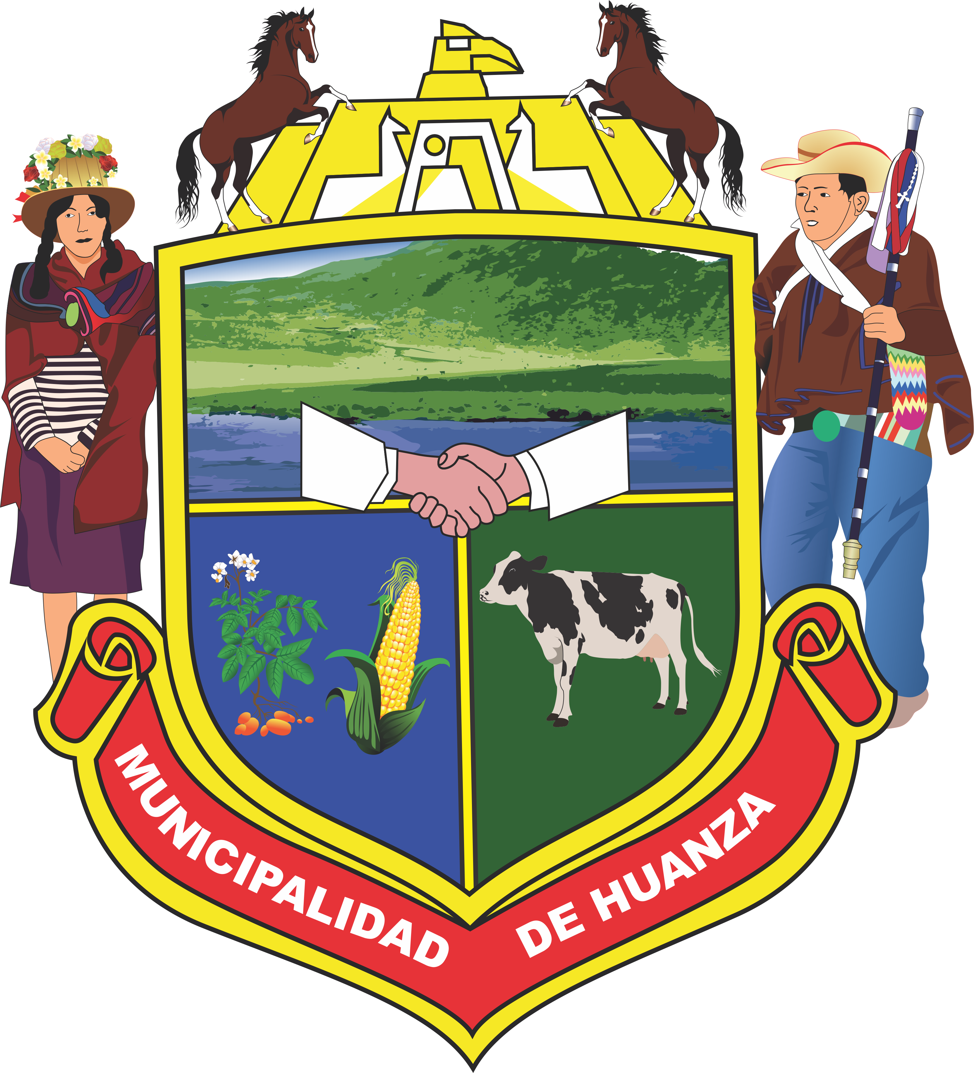 Runa Simi: ESCUDO DE LA MUNICIPALIDAD DISTRITAL DE HUANZA